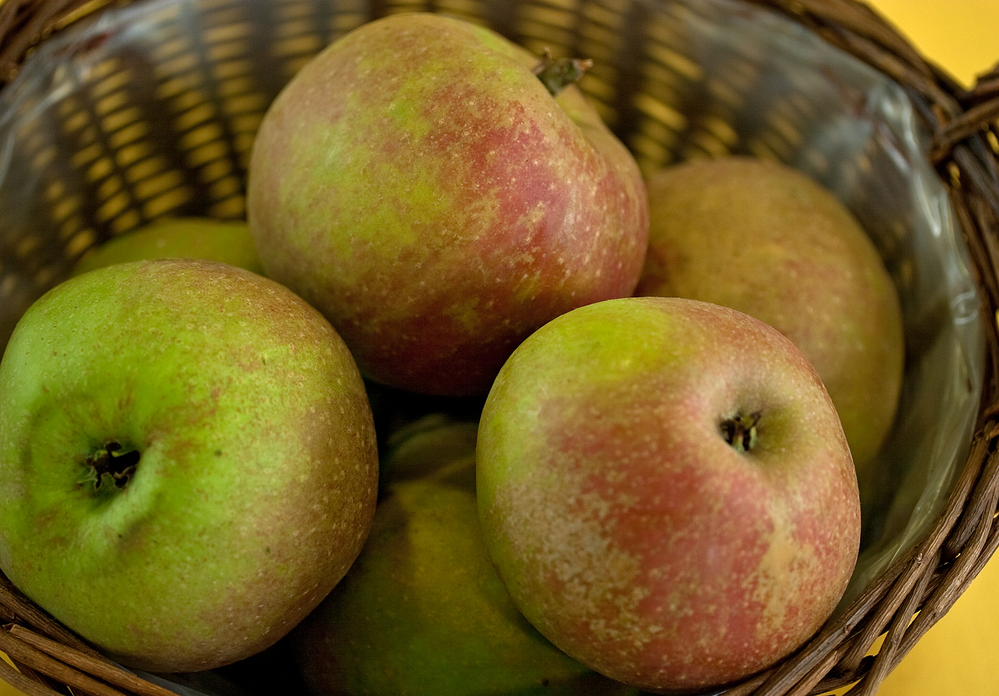 Der Boskoop ist eine Apfelsorte